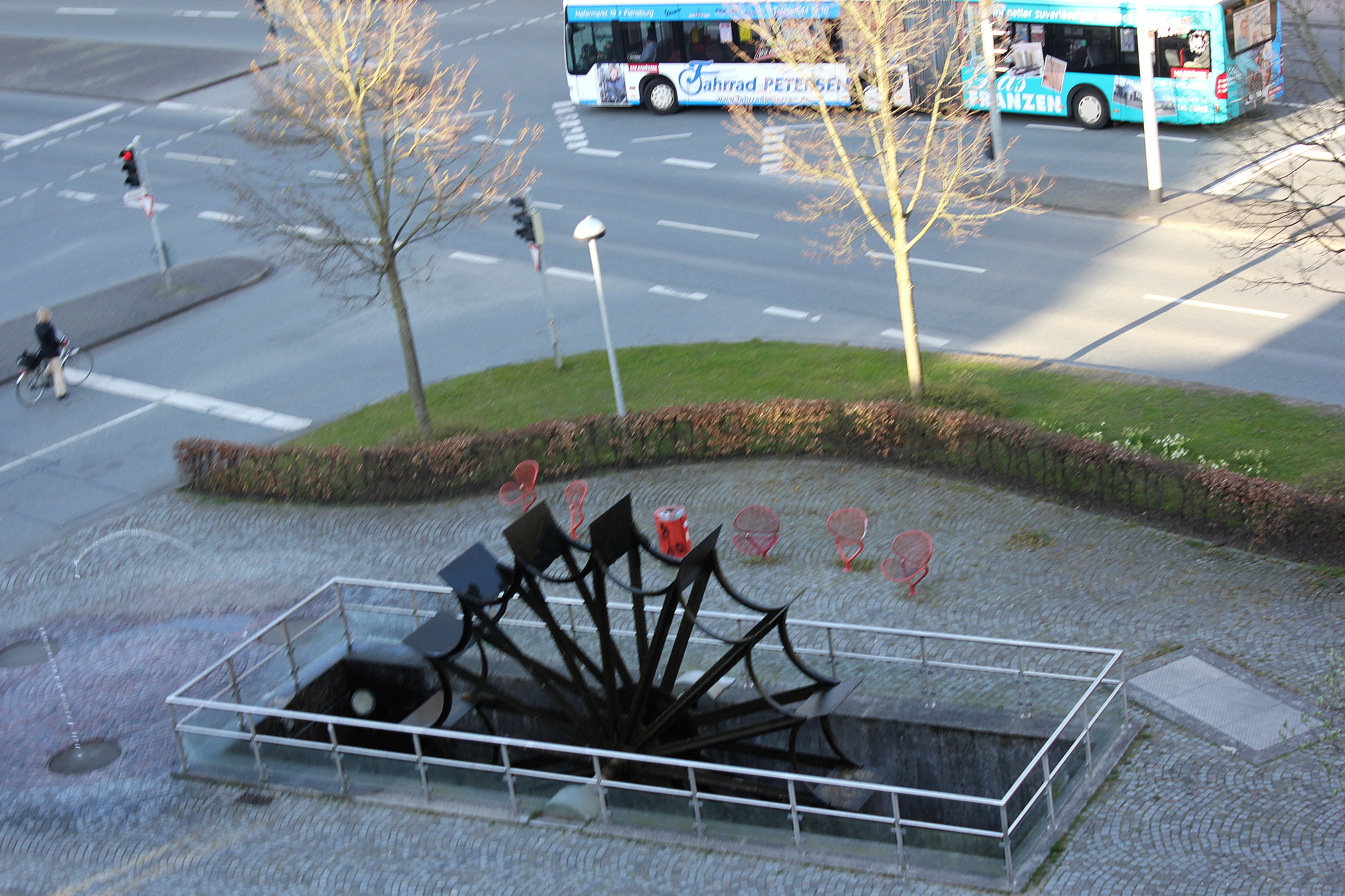 Mühlenstrom-Wasserrad beim ZOB, Flensburg, Bild 6